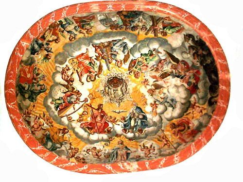 Ermita de San José (Ayuntamiento de Ayora)